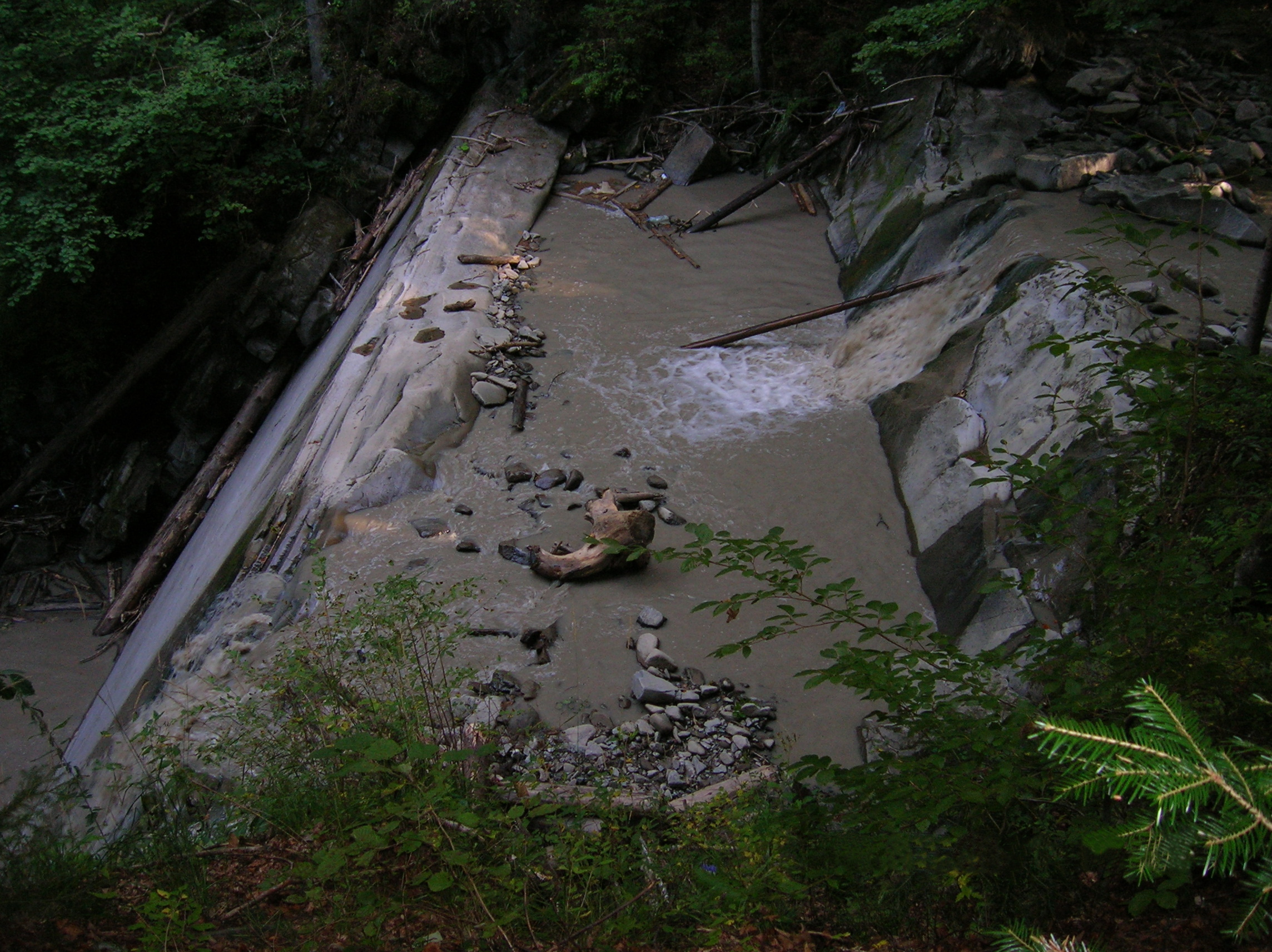 Munţii Tarcăului (Carpaţii Orientali, România)-Cascada Bolovăniş, treptele inferioare